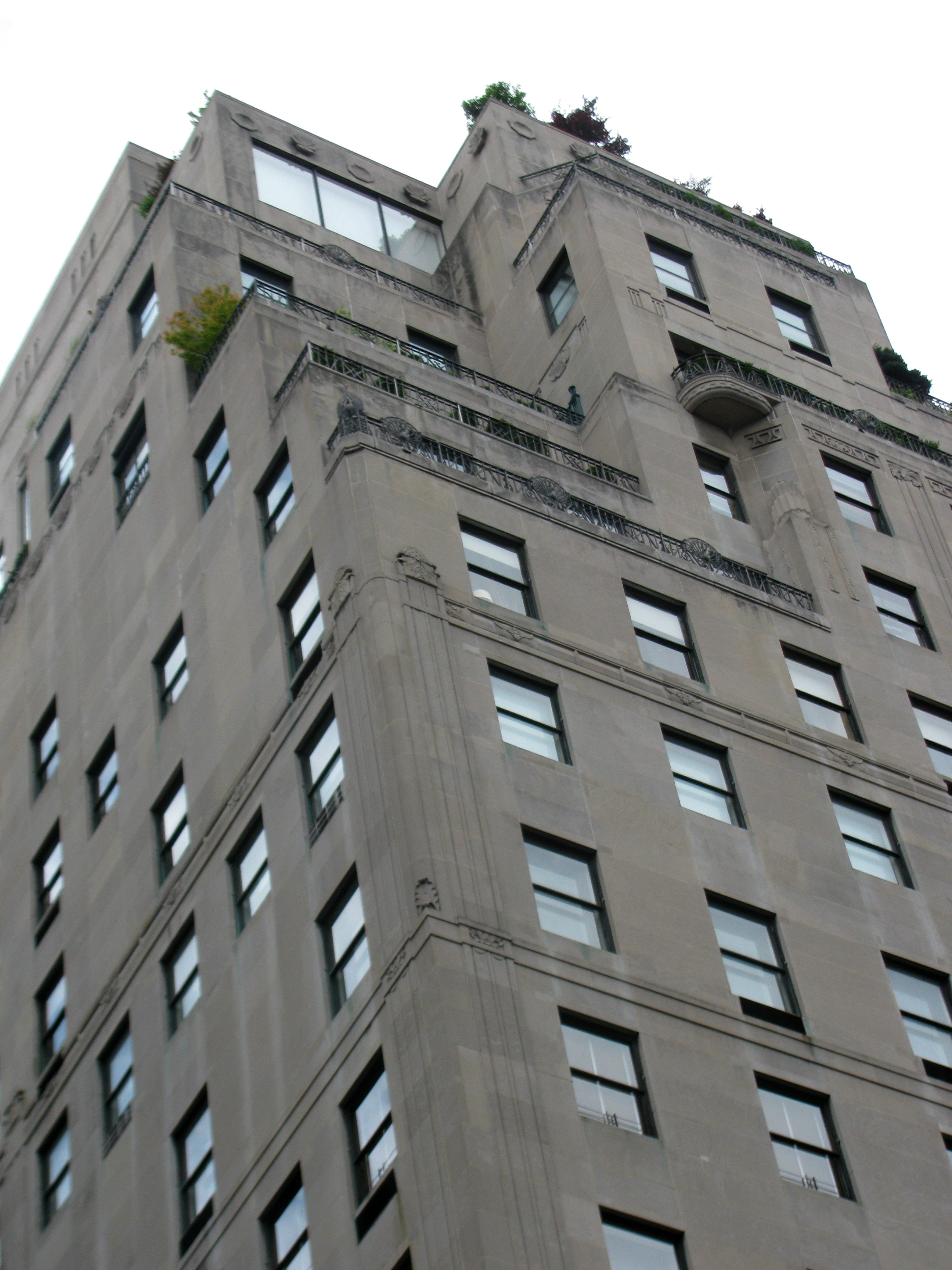 740 Park Avenue (Detail)